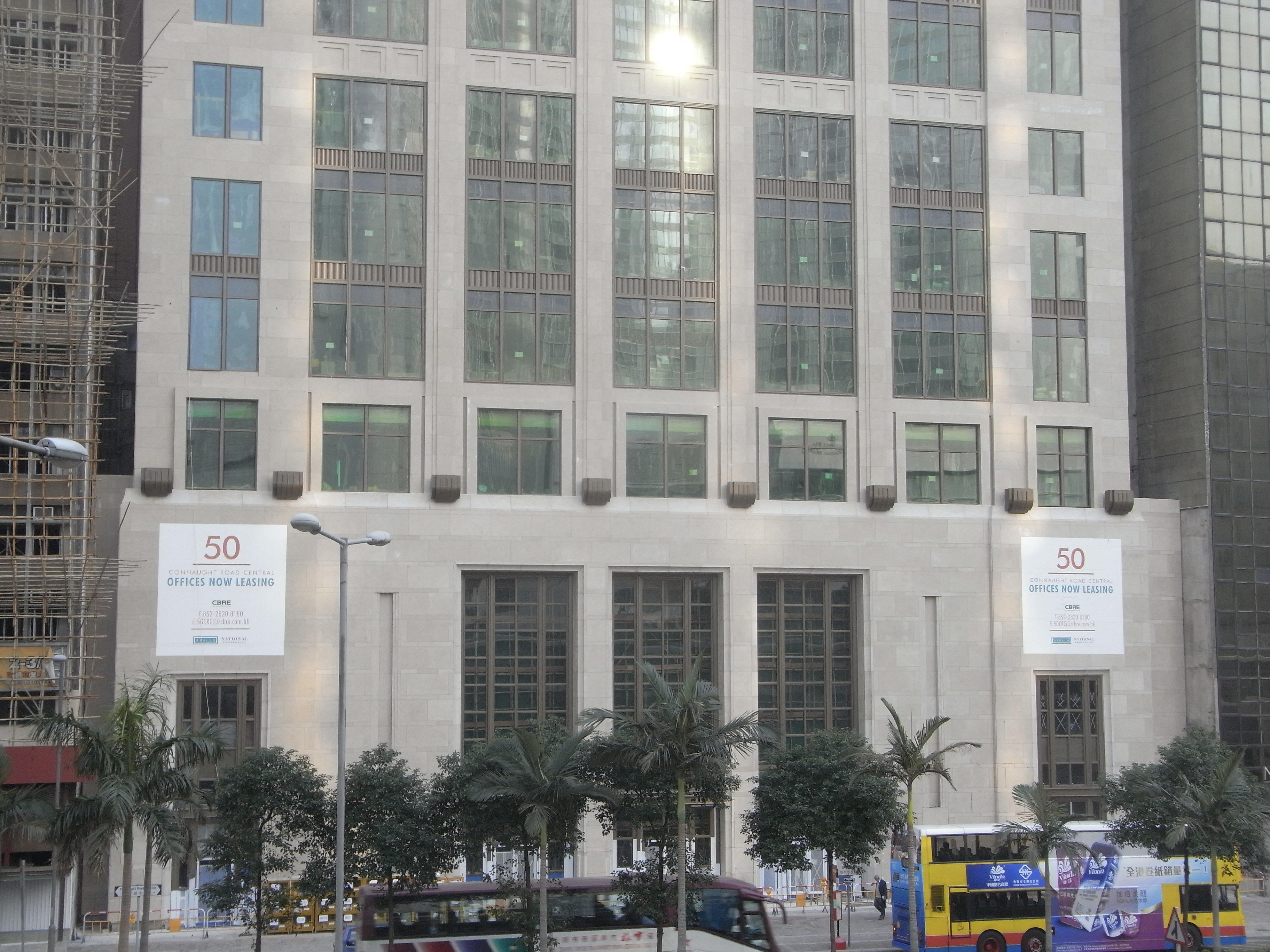 香港島zh:中環zh-yue:干諾道中50號, Connaught Road, Hong Kong